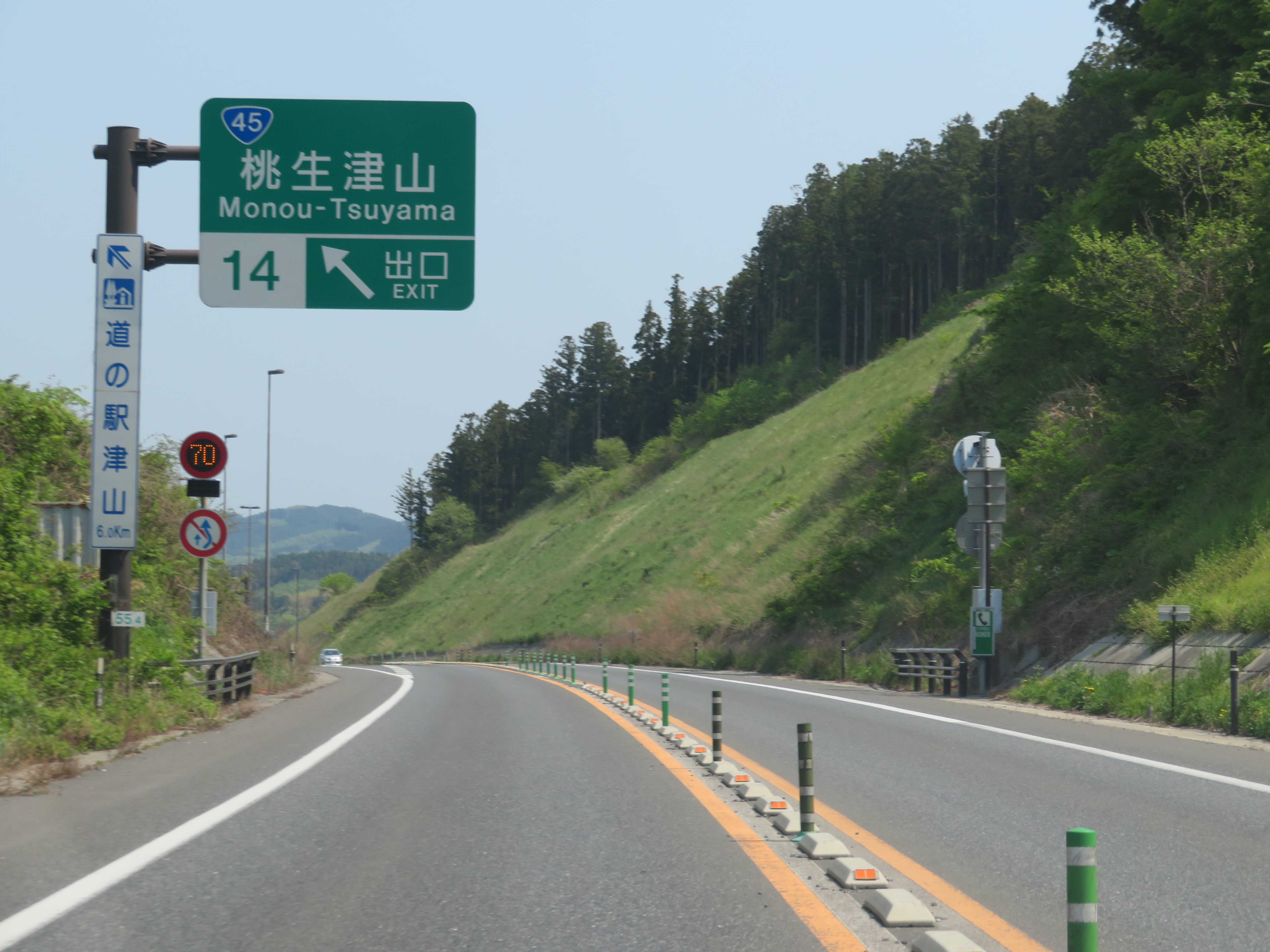 三陸自動車道桃生津山ＩＣ出口付近（気仙沼方面を撮影） Canon PowerShot SX720 HS